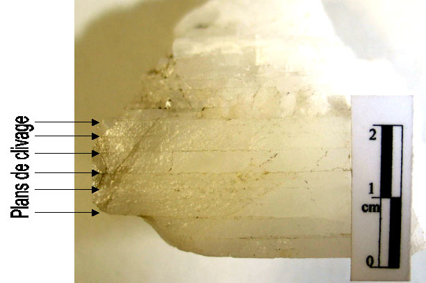 Quartz clivé de Saint-Paul-la-Roche (Dordogne). Ce quartz ultra pur a la propriété exceptionnelle d'être clivable. Les plans de clivage sont bien visibles sur la photo. Certains voient en cette propriété une conséquence de l'impact météoritique de Rochechouart-Chassenon, d'autres expliquent son origine dans une cristallisation sous contraintes uni-directionnelles. Le filon est malheureusement épuisé, sur-exploité dans les années 1970. Auteur Ce morceau de minéral a été trouvé par François Kraut qui l'a donné à son collègue François Permingeat. Il appartient maintenant à la collection du laboratoire de minéralogie de l'Observatoire Midi-Pyrénées à Toulouse. Photo de Guillaume Fleury (août 2006).